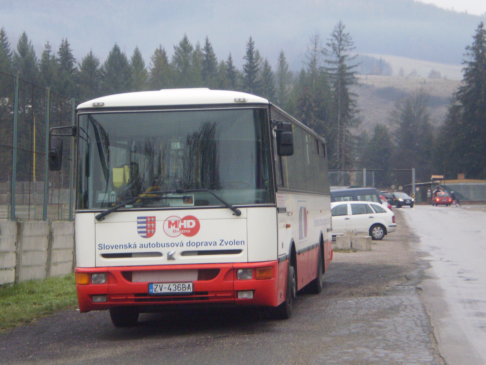 MHD Brezno